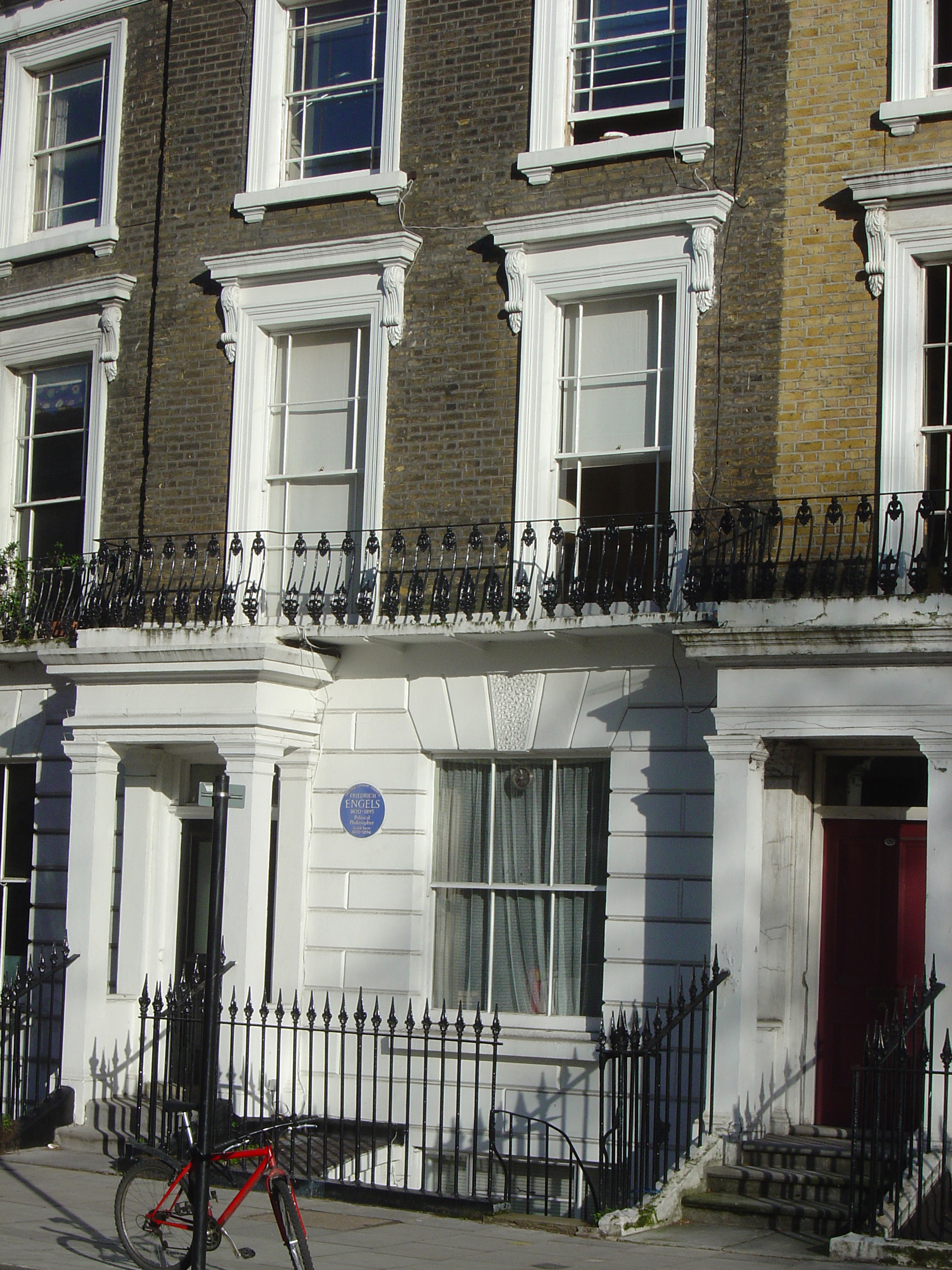 Friedrich Engels' House in Primrose Hill – London